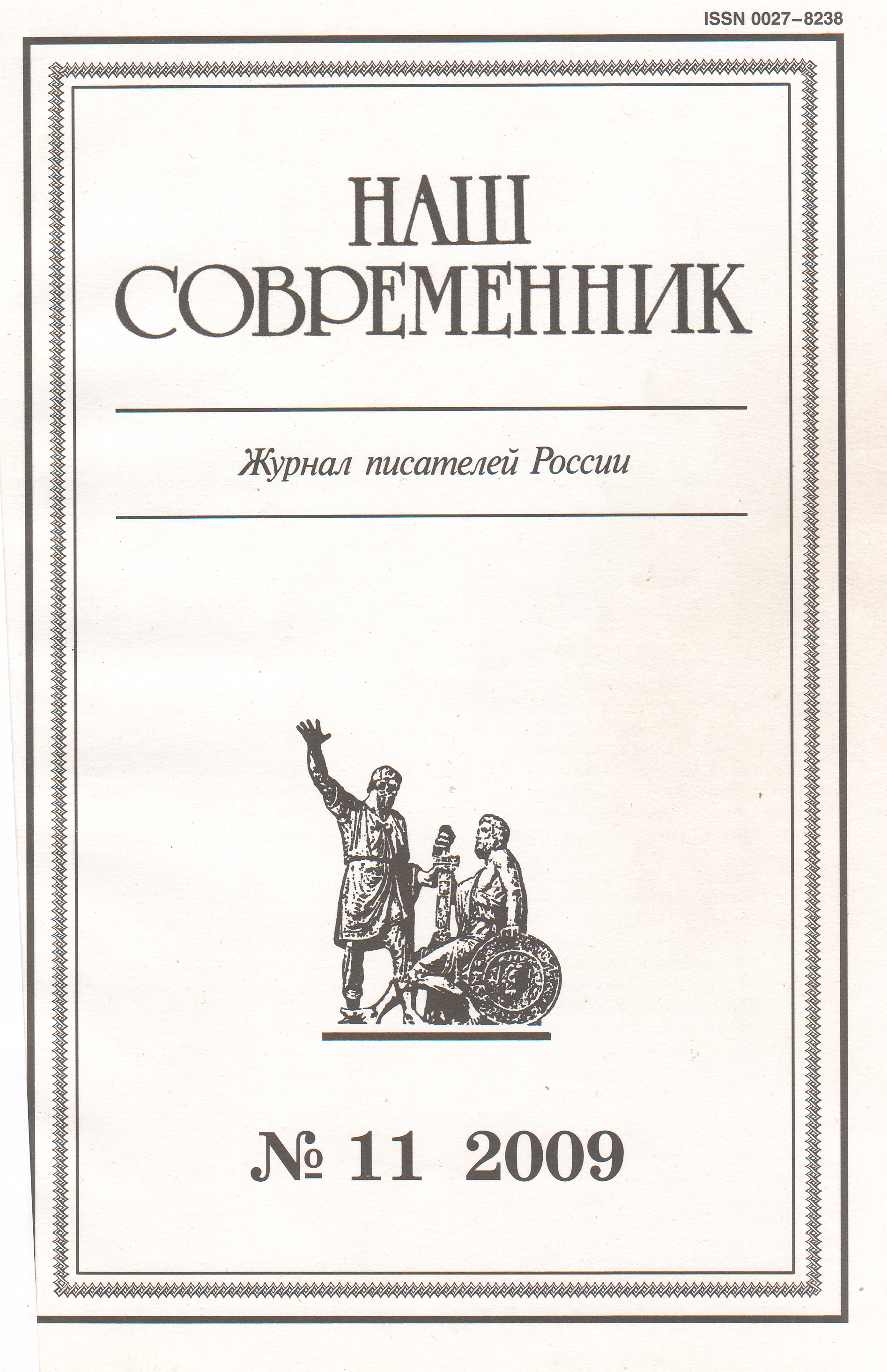 Наш Современник 2009, №11, где напечатан первый рассказ Андрея Белозёрова о войне 1992 года в Бендерах